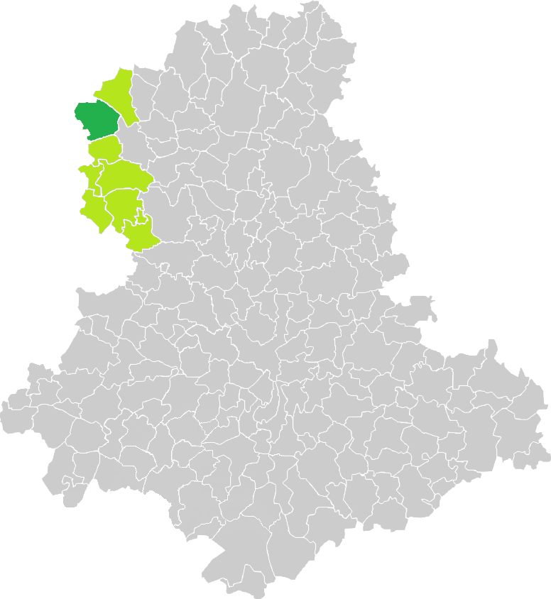 Carte de situation de la commune de Saint-Barbant (en vert foncé) dans le votre Canton (en vert clair) sur une carte des communes de la Haute-Vienne